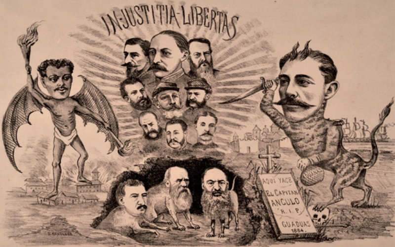 Alberto Urdaneta (atribuido) In Justitia Libertas (Ricardo Gaitán Obeso) Litografía sobre papel 35,6 x 54,8 cm Colección Banco de la República